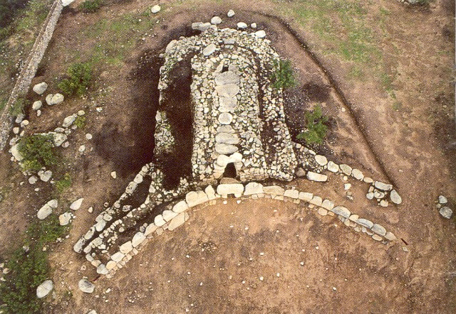 Fotografia della tomba dei giganti di Osono, Triei